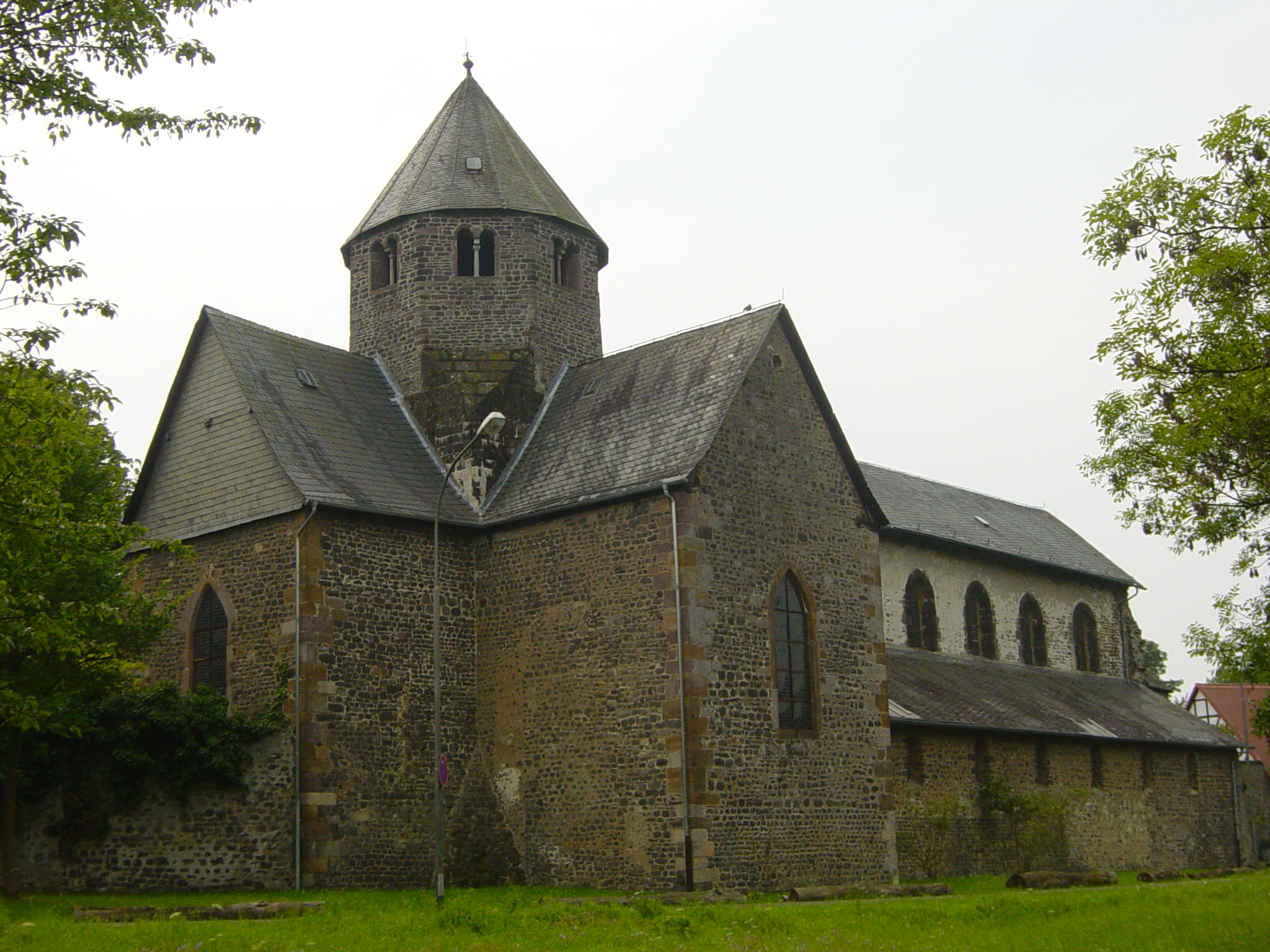 Schiffenberg, Klosterkirche, Nordseite, Ansicht von Nord-Ost